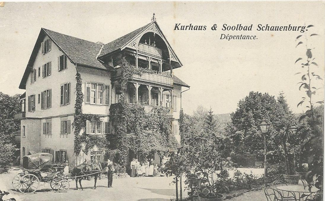 Postkarte Dependance ca. 1920